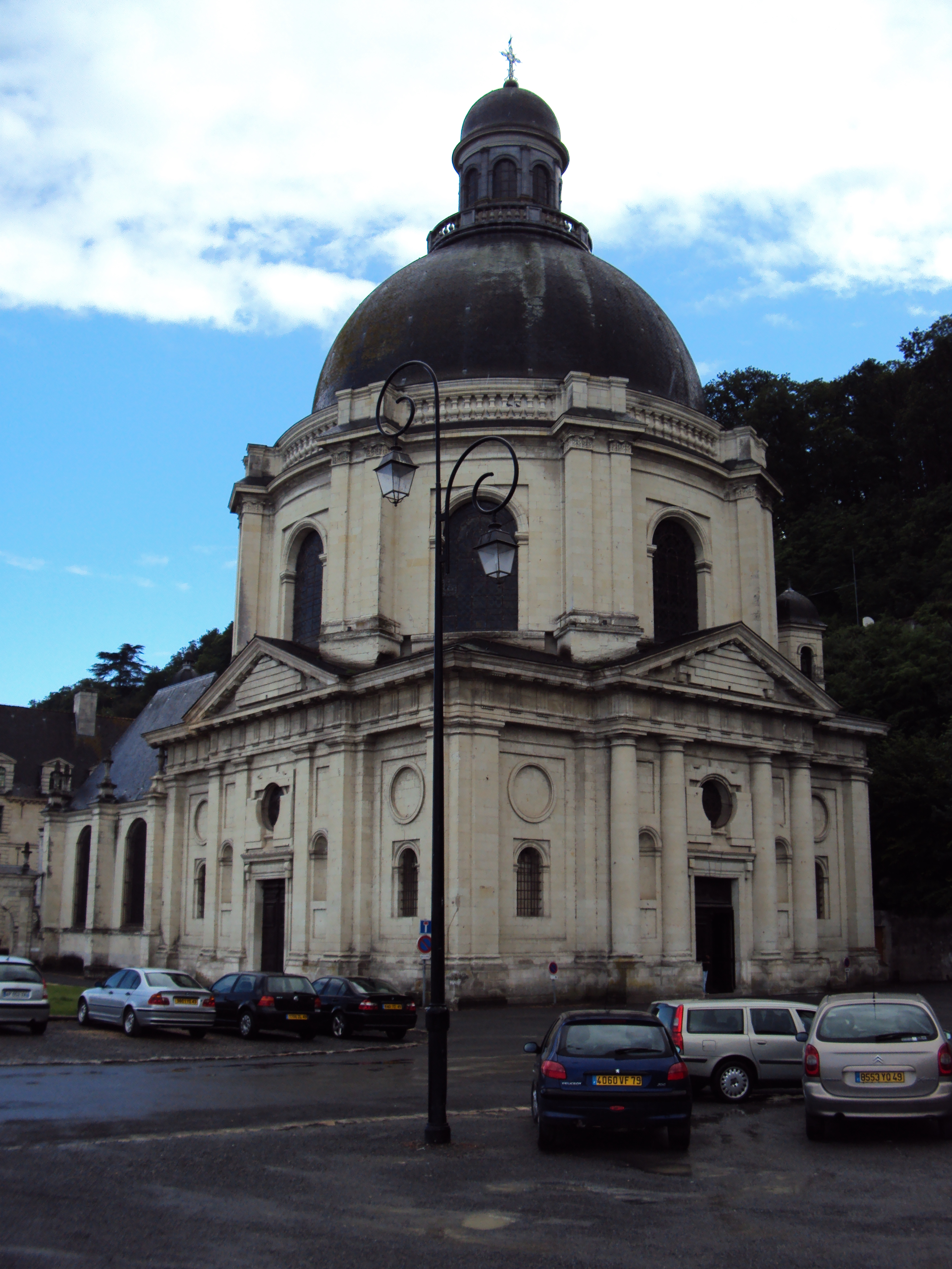 Façade de l'église Notre-Dame-des-Ardilliers à Saumur.